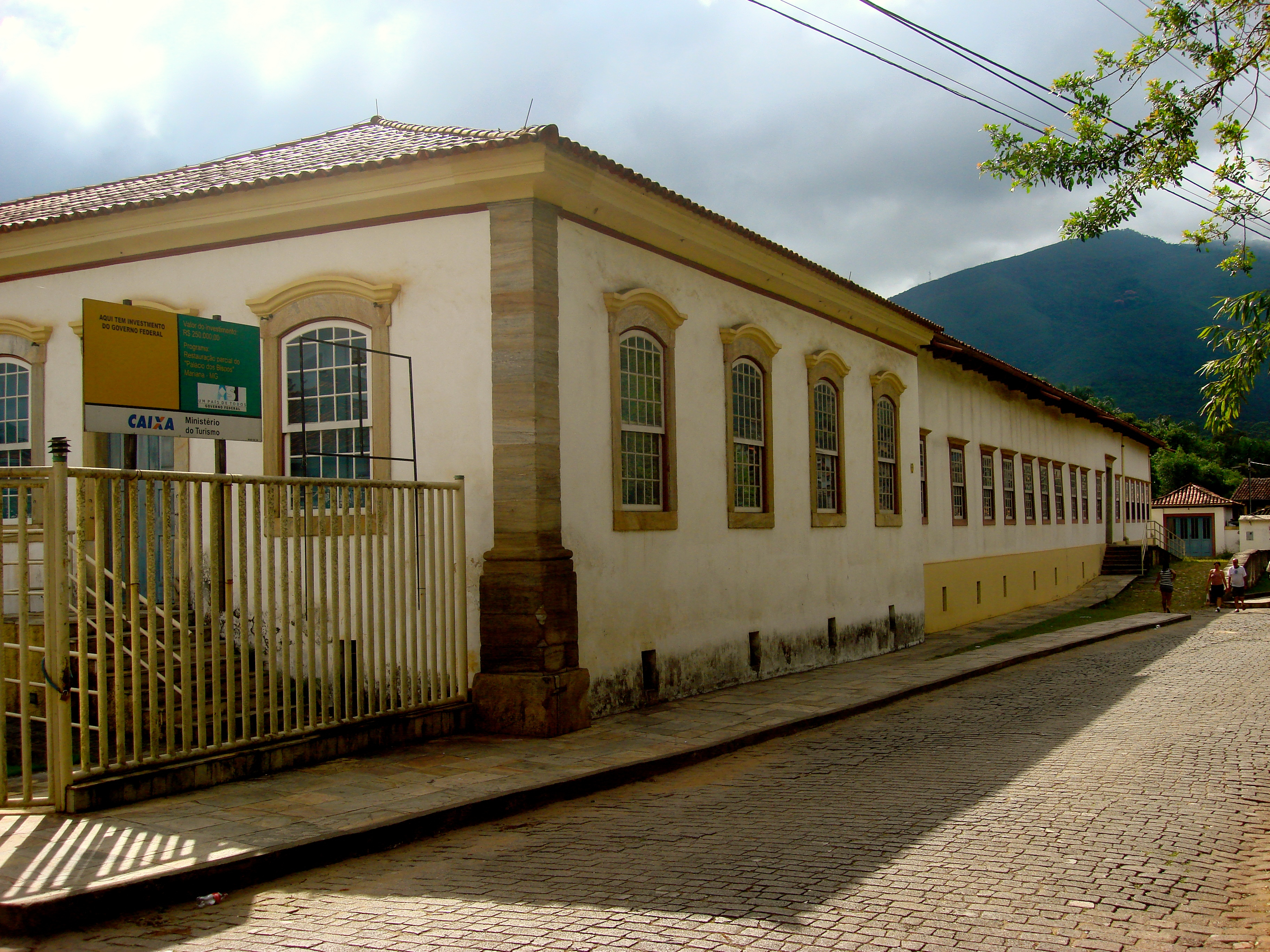 Museu da Música de Mariana em março de 2013